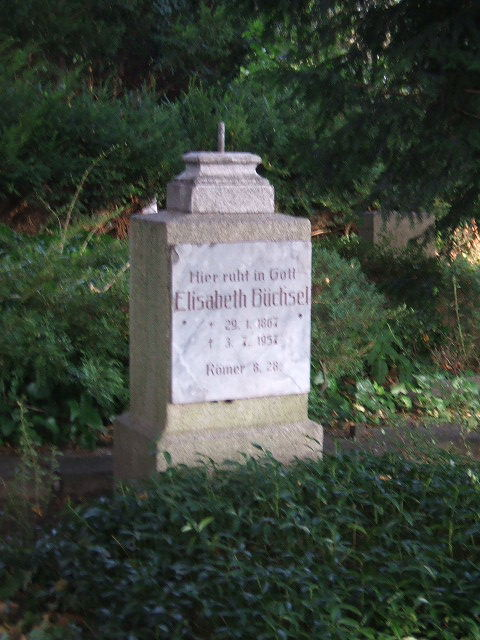 Grabmal von Elisabeth Büchsel auf dem Stralsunder Knieperfriedhof